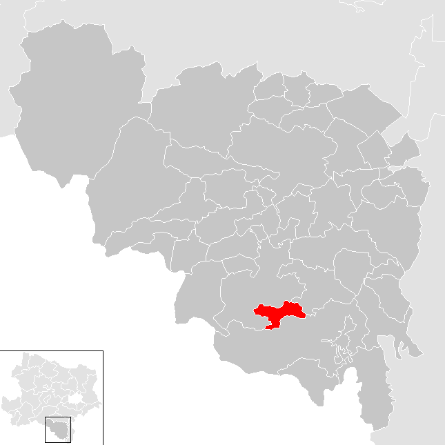 Bezirk Neunkirchen